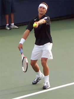 self made photo